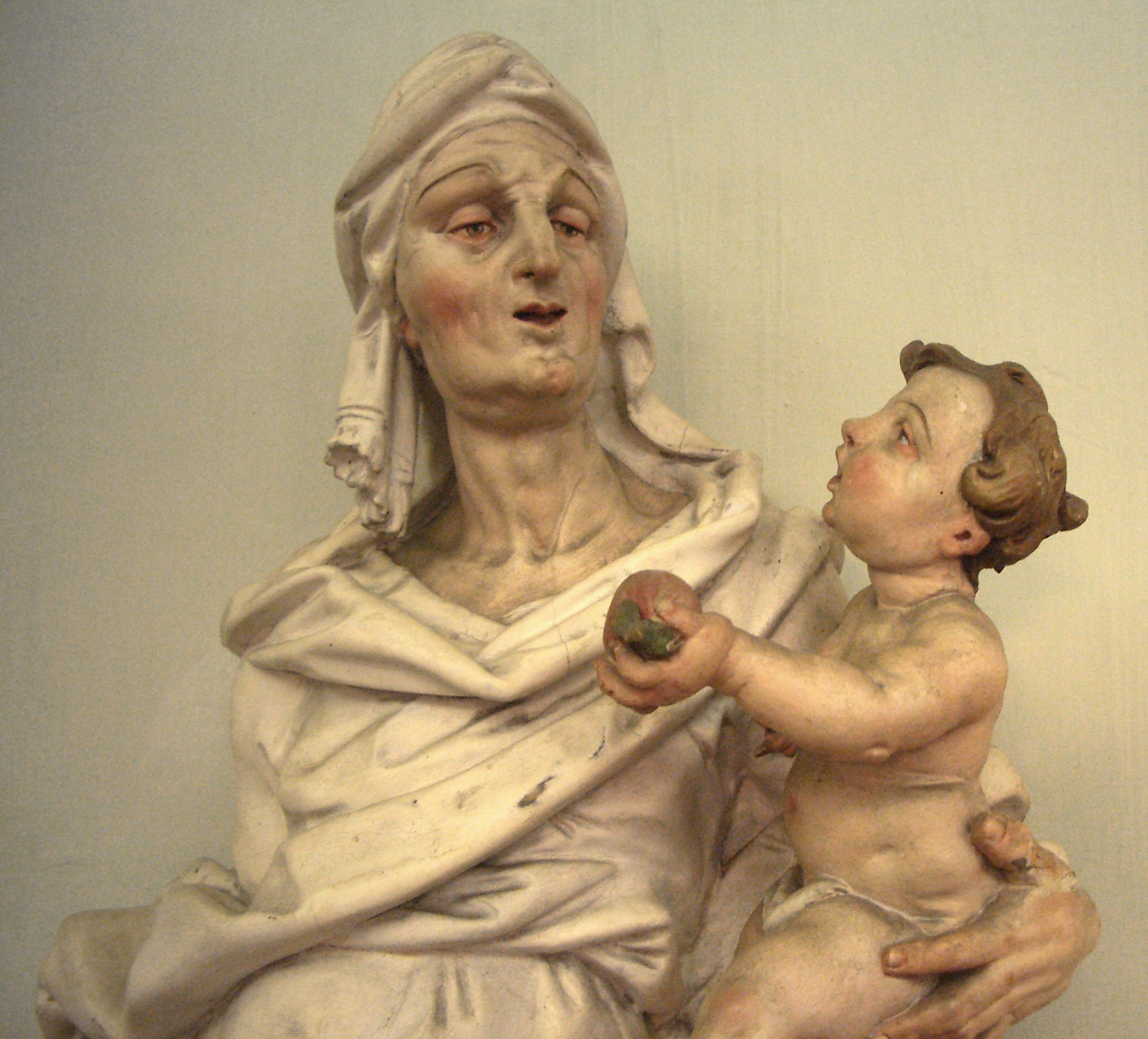 Joseph Anton Feuchtmayer: Hl. Anna Selbdritt (1750), Detail Stadtmuseum Überlingen (ursprünglich Ausstattung der Reichlin v. Meldeggschen Kapelle)